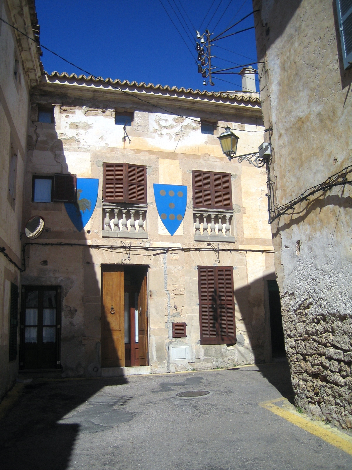 Gasse in Capdepera mit Stadtwappen